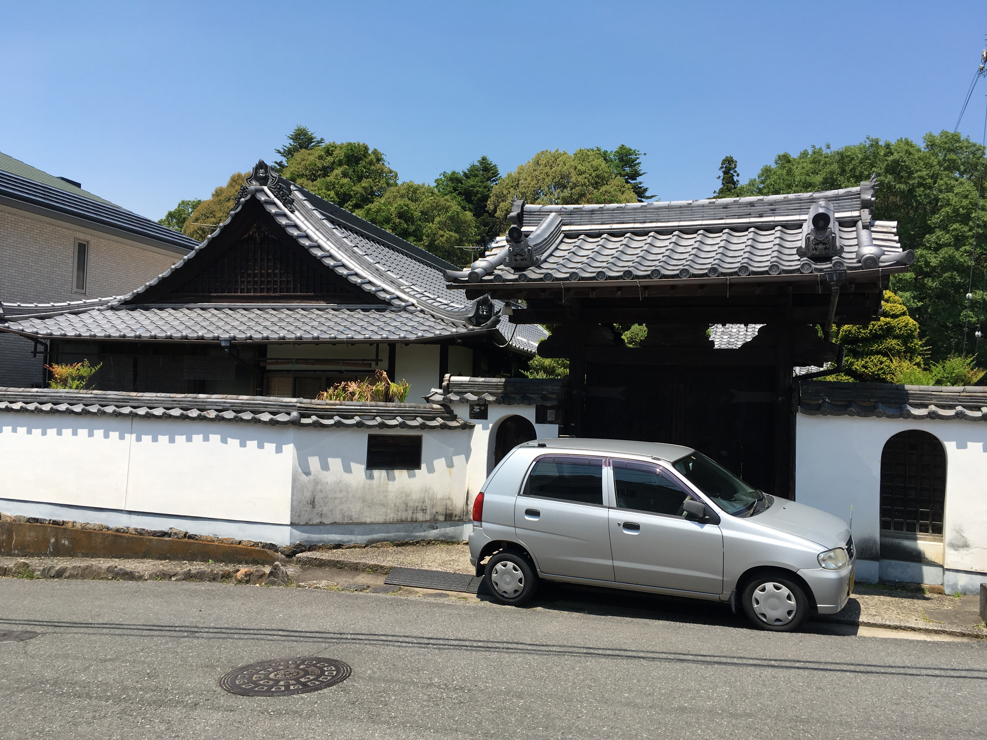 隔夜寺、奈良高畑町。境内外南側から